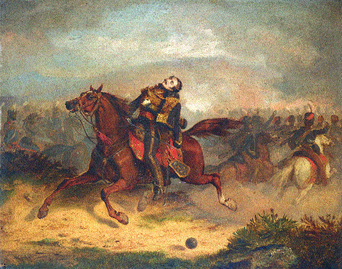 Mort du capitaine Nolan à la bataille de Balaklava, le 25 octobre 1854, au cours de la charge de la brigade légère. Désigné pour transmettre l'ordre intimant à la cavalerie britannique de récupérer les canons tombés aux mains des Russes, Nolan fut la première victime de la charge, tué par un éclat d'obus quelques minutes après le début de l'attaque.